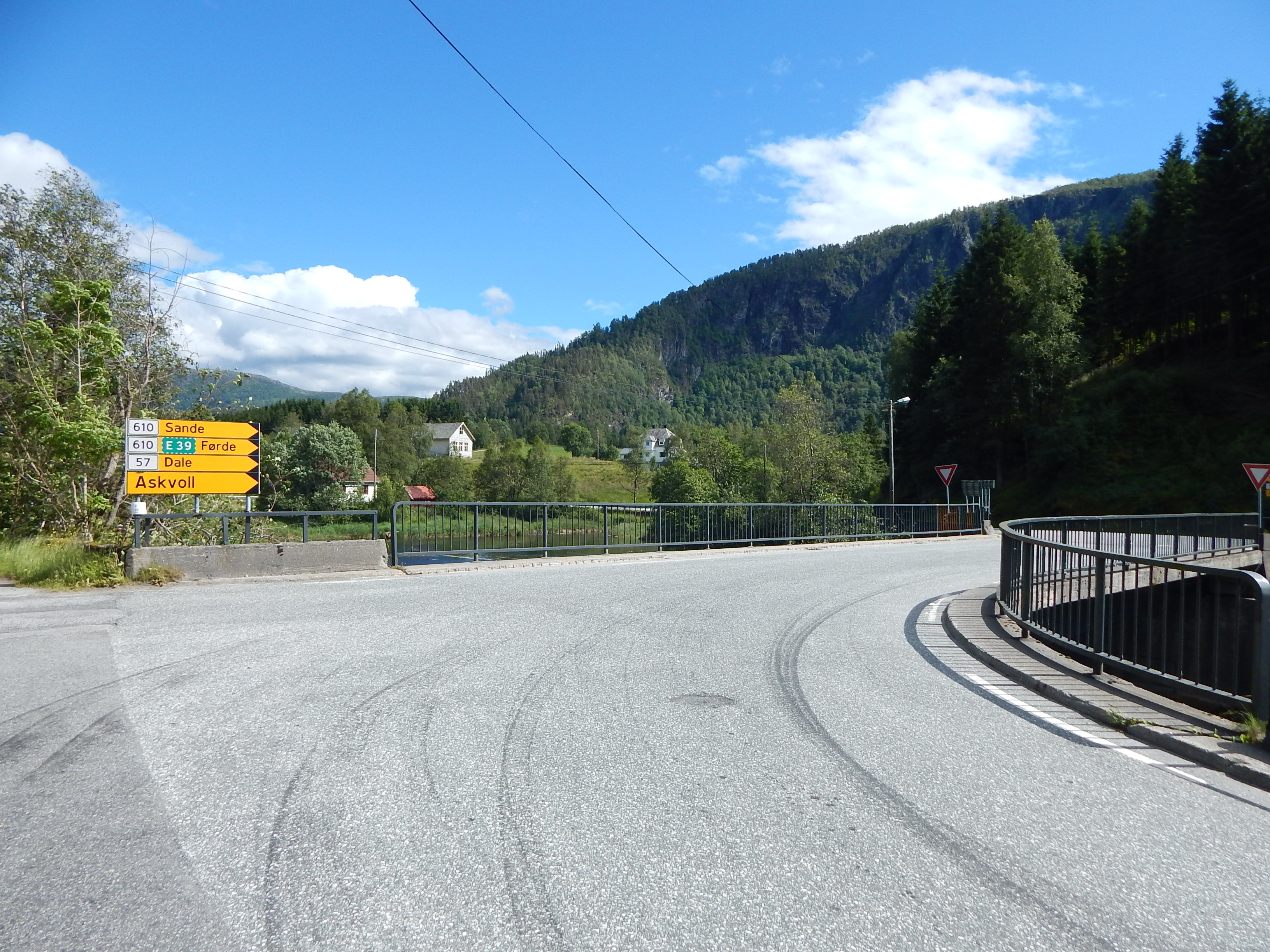 Primær fylkesvei 57 over Osen bru